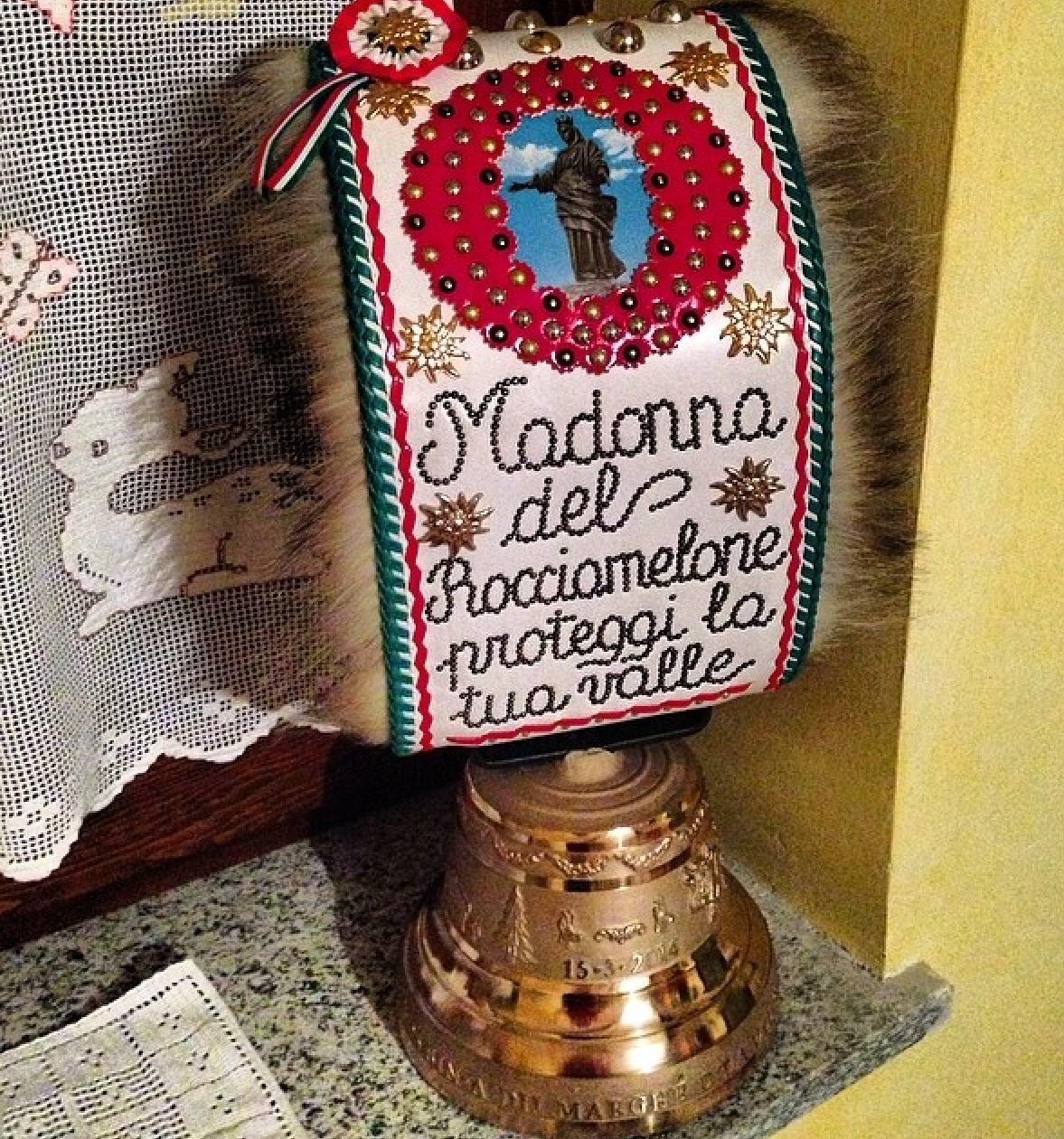 Campana per vacca decorata